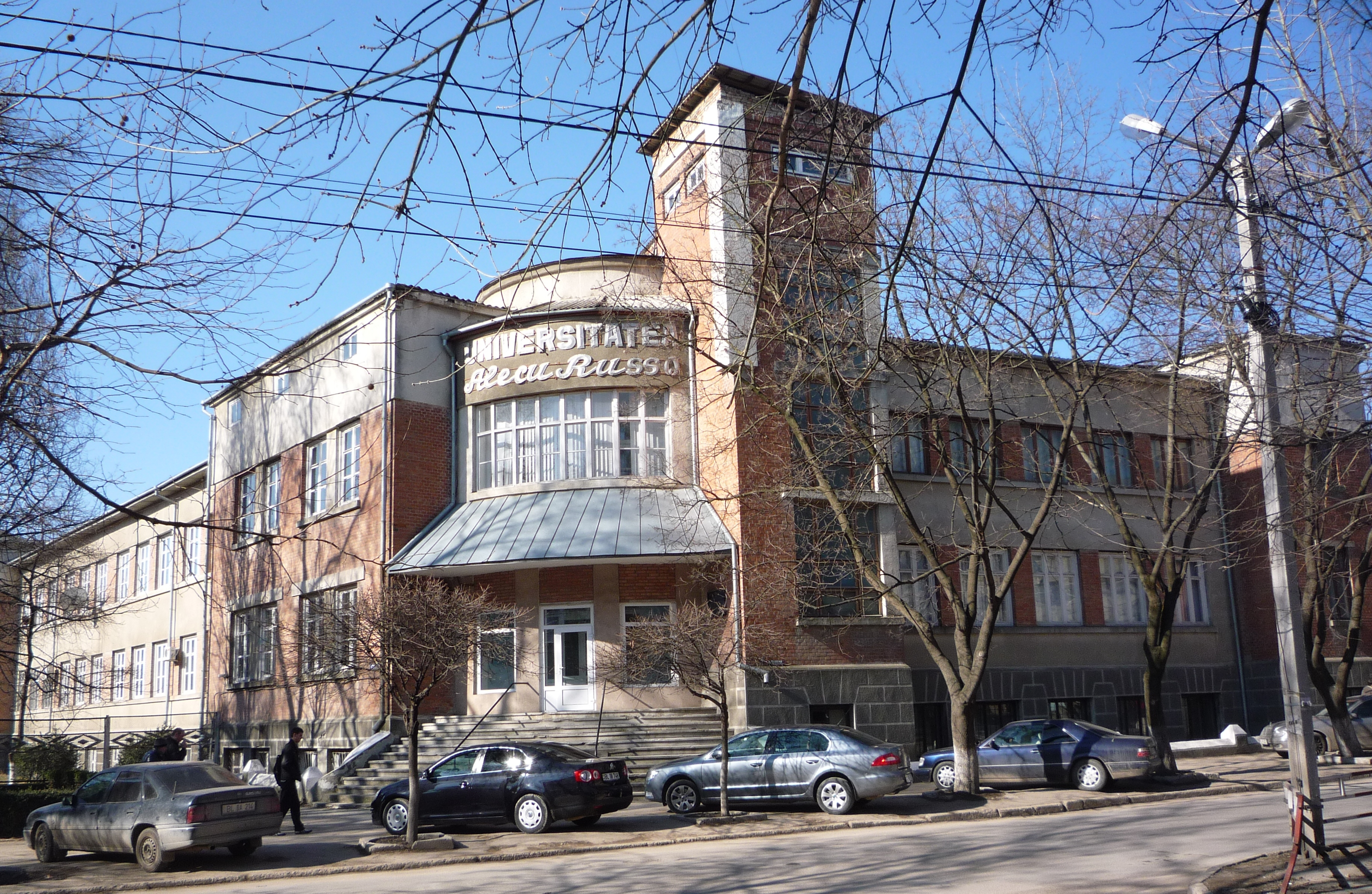 Blocul Administrativ al Universităţii Alecu Russo din Bălţi